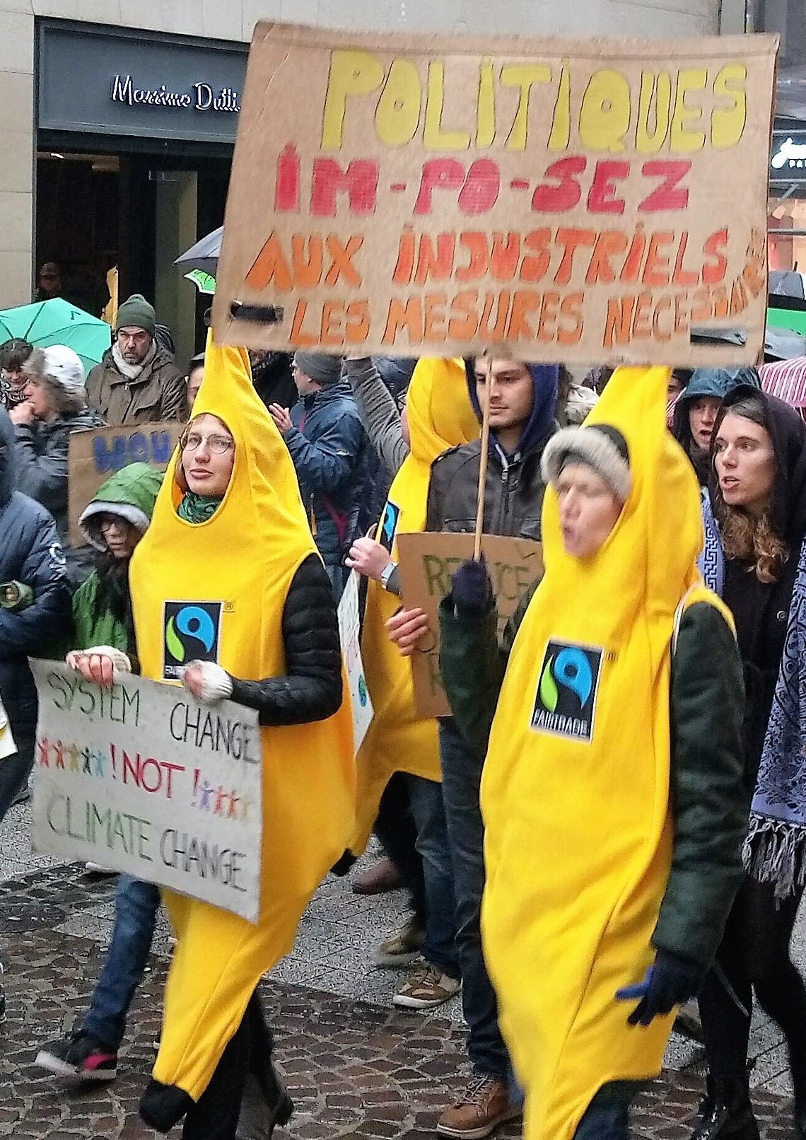 Luxembourg, Marche pour le climat organisée par le collectif "Rise for Climate" et les ONG Frères Des Hommes (FDH), CELL, Etika, Attac et Eurosolar le 8 décembre 2018 pour sonner l'état d'urgence climatique et mettre la pression sur les gouvernements qui négocieront pendant la COP24 en Pologne.